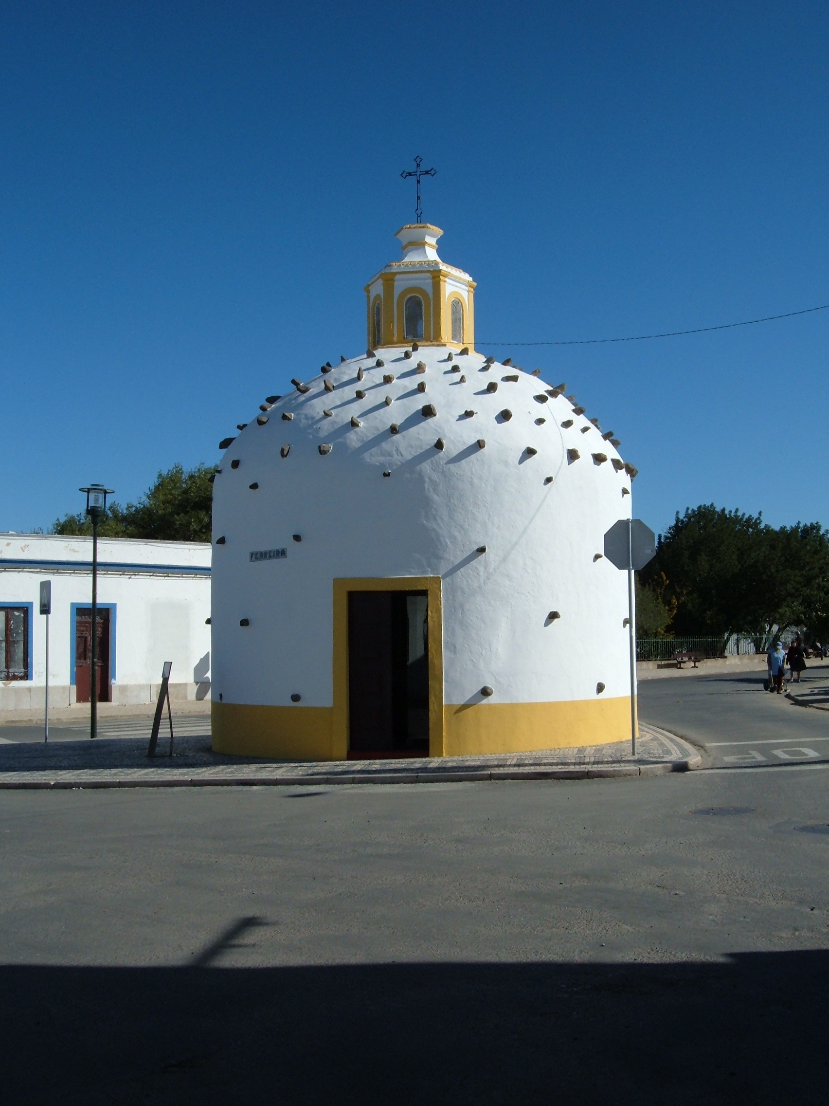 Capela do Calvário aliás Capela de Santa Maria Madalena aliás Igreja das Pedras em Ferreira do Alentejo em Portugal. Originalmente erguia-se na Rua do Calvário. Foi demolida em finais do século XIX e reconstruída mais a norte.